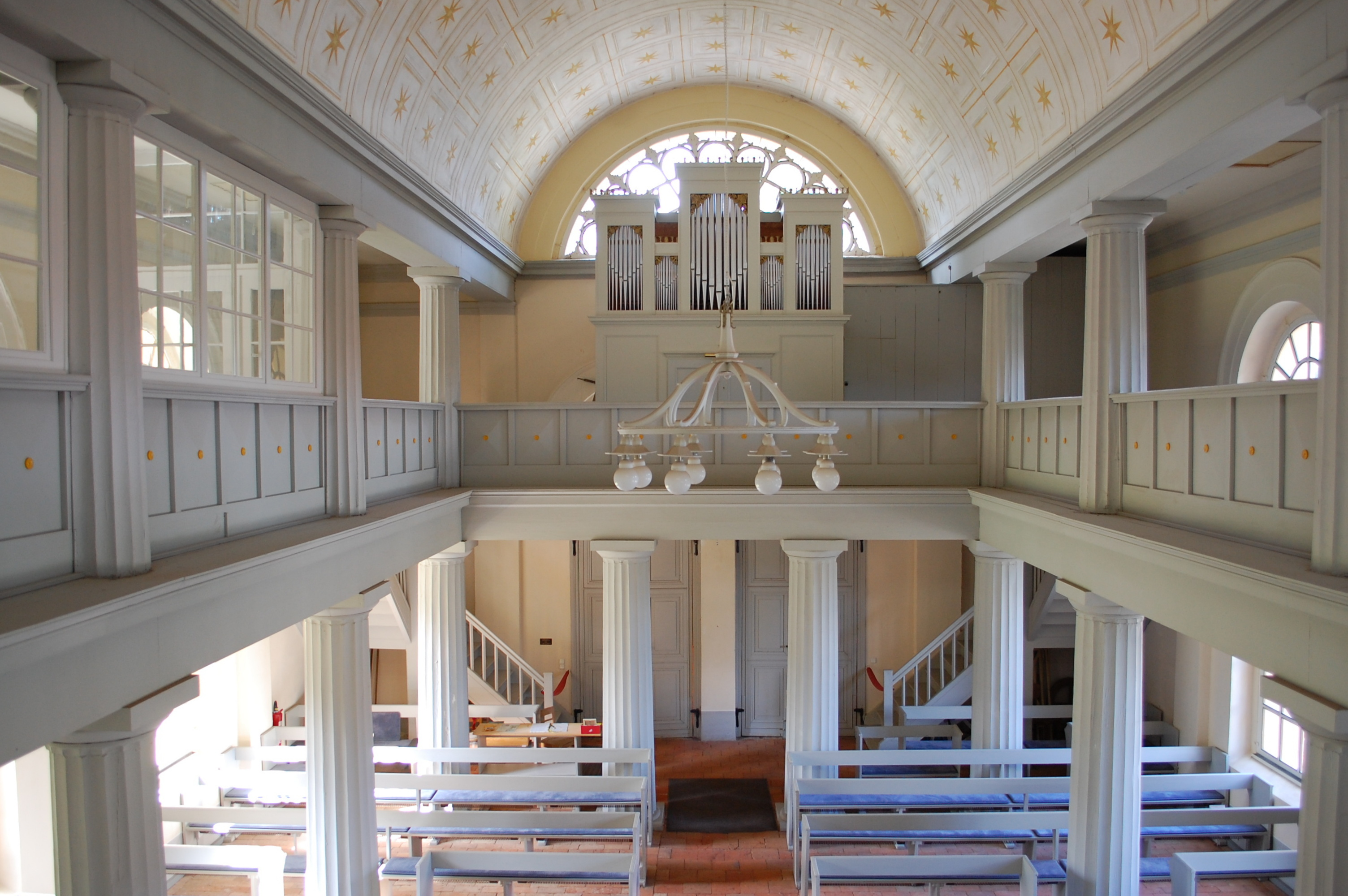 Blick von der Kanzel in das Kirchenschiff von Annenwalde